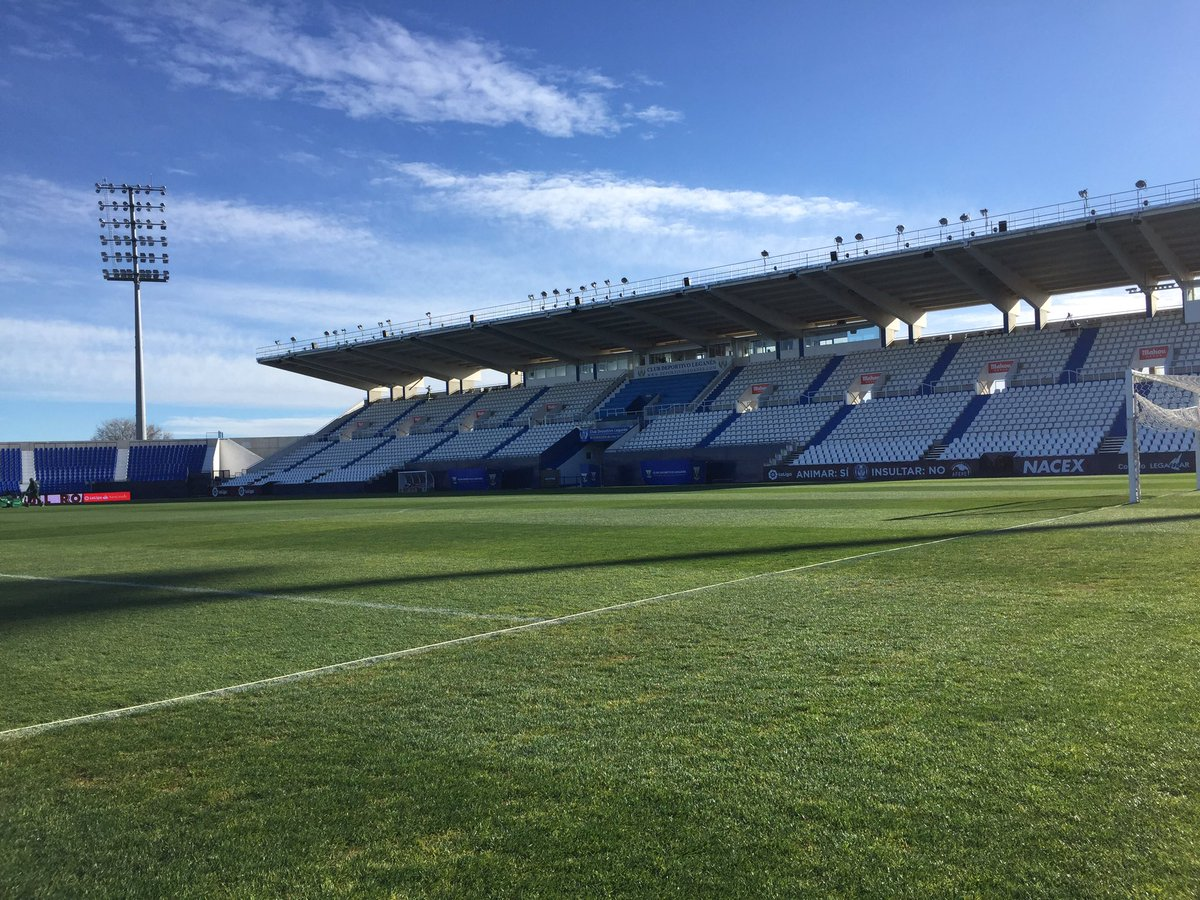 Vista de la tribuna de Butarque tras ampliación